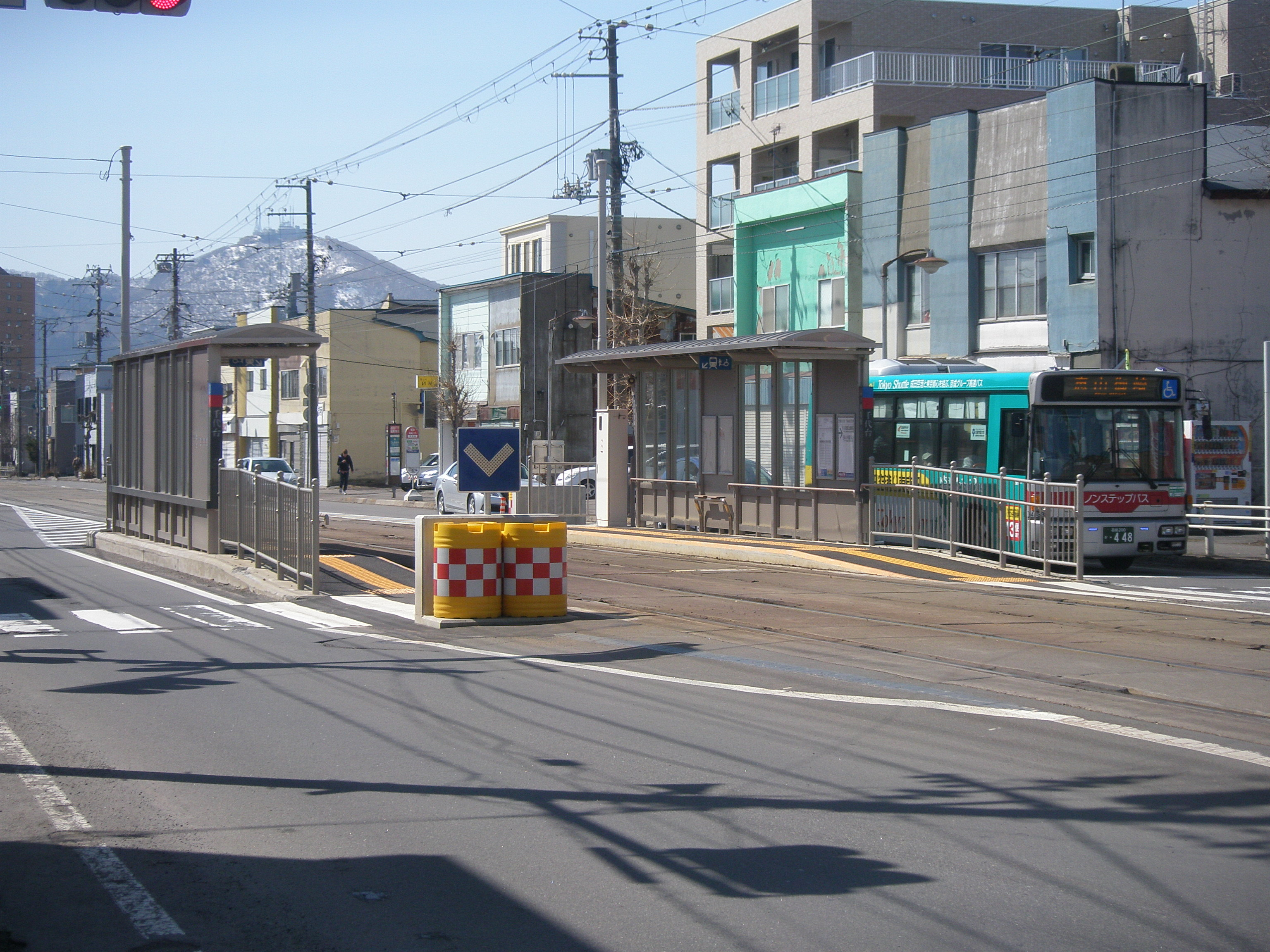 千代台停留場・全景（2018年3月24日撮影）